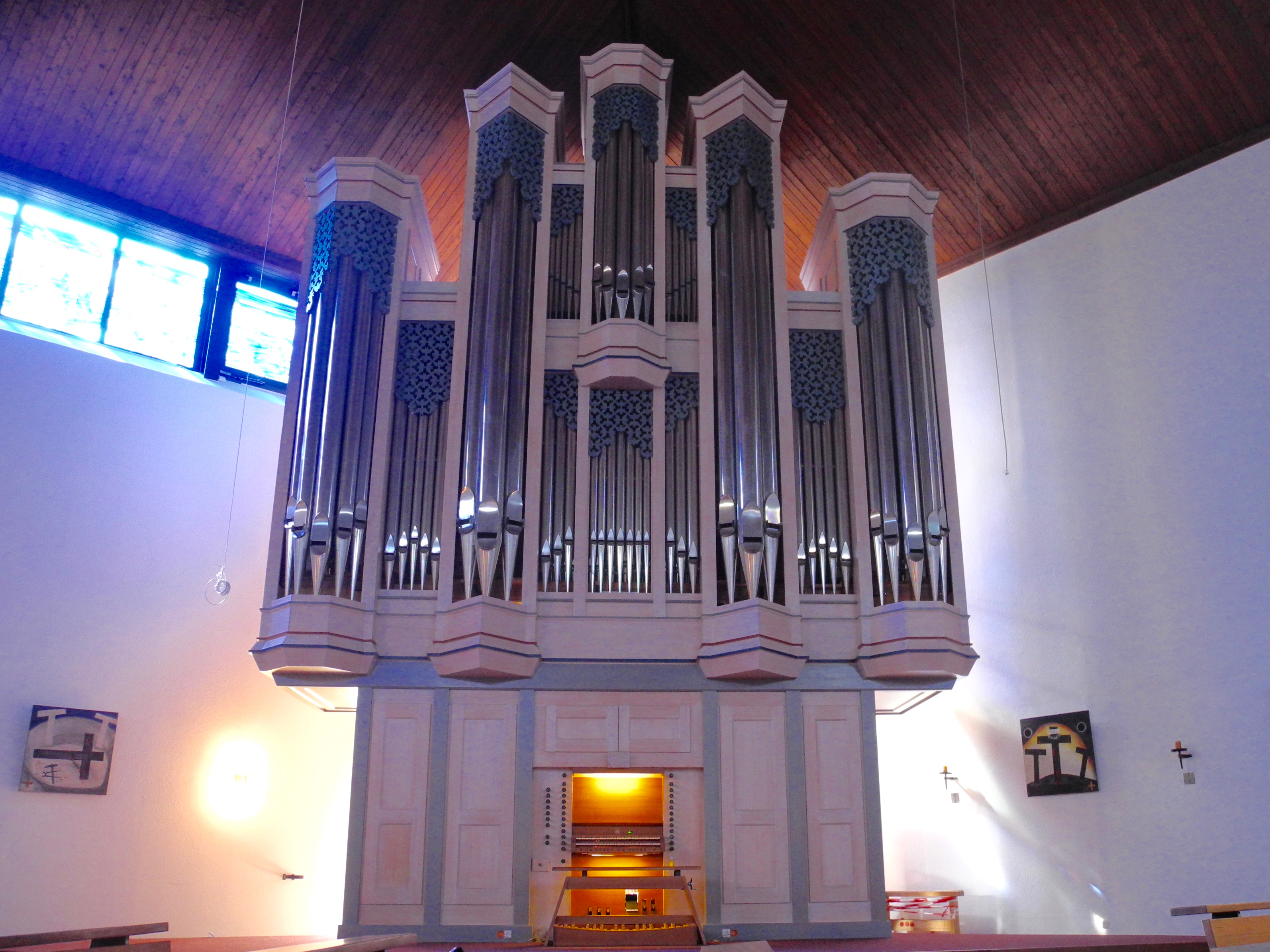 Hier steht ein neuer Stern im Amberger Orgelhimmel- die Sandtnerin (31-II-P) von 1995, aus der säkularisierten Kirche Essen-Kupferdreh